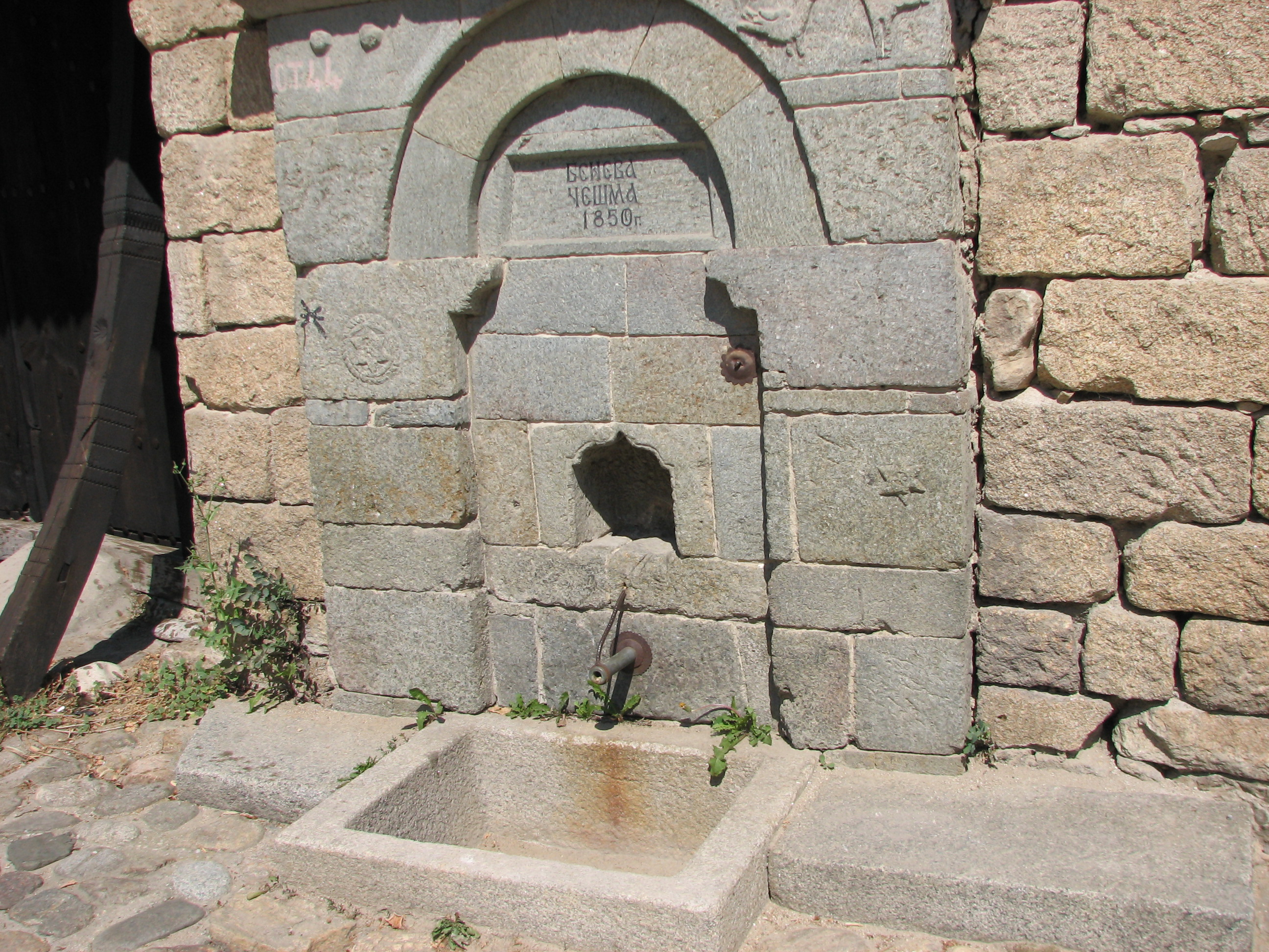 Бенева чешма